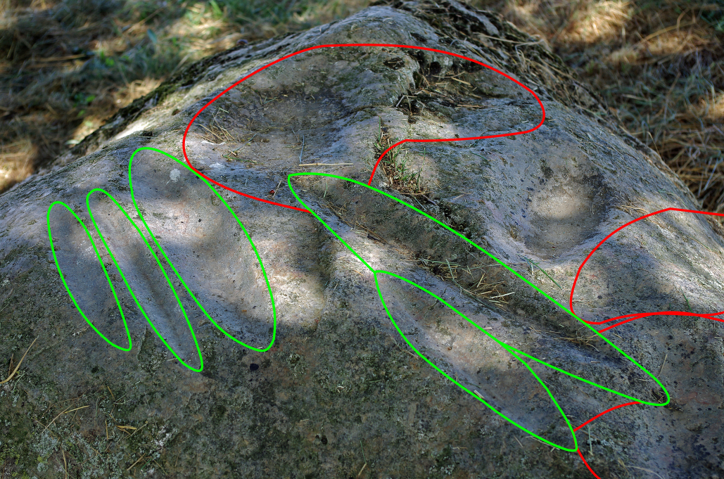 Détail des rainures de la Pierre Saint-Martin de Luzillé